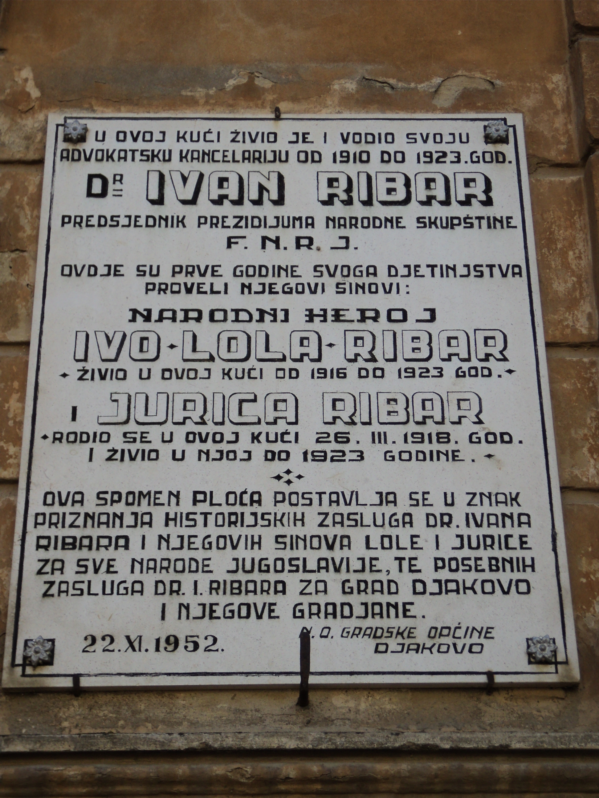 Kuća u Đakovu, u kojoj je dr. Ivan Ribar držao svoju kancelariju od 1910. do 1923. godine. Self-made. Jul 2011.